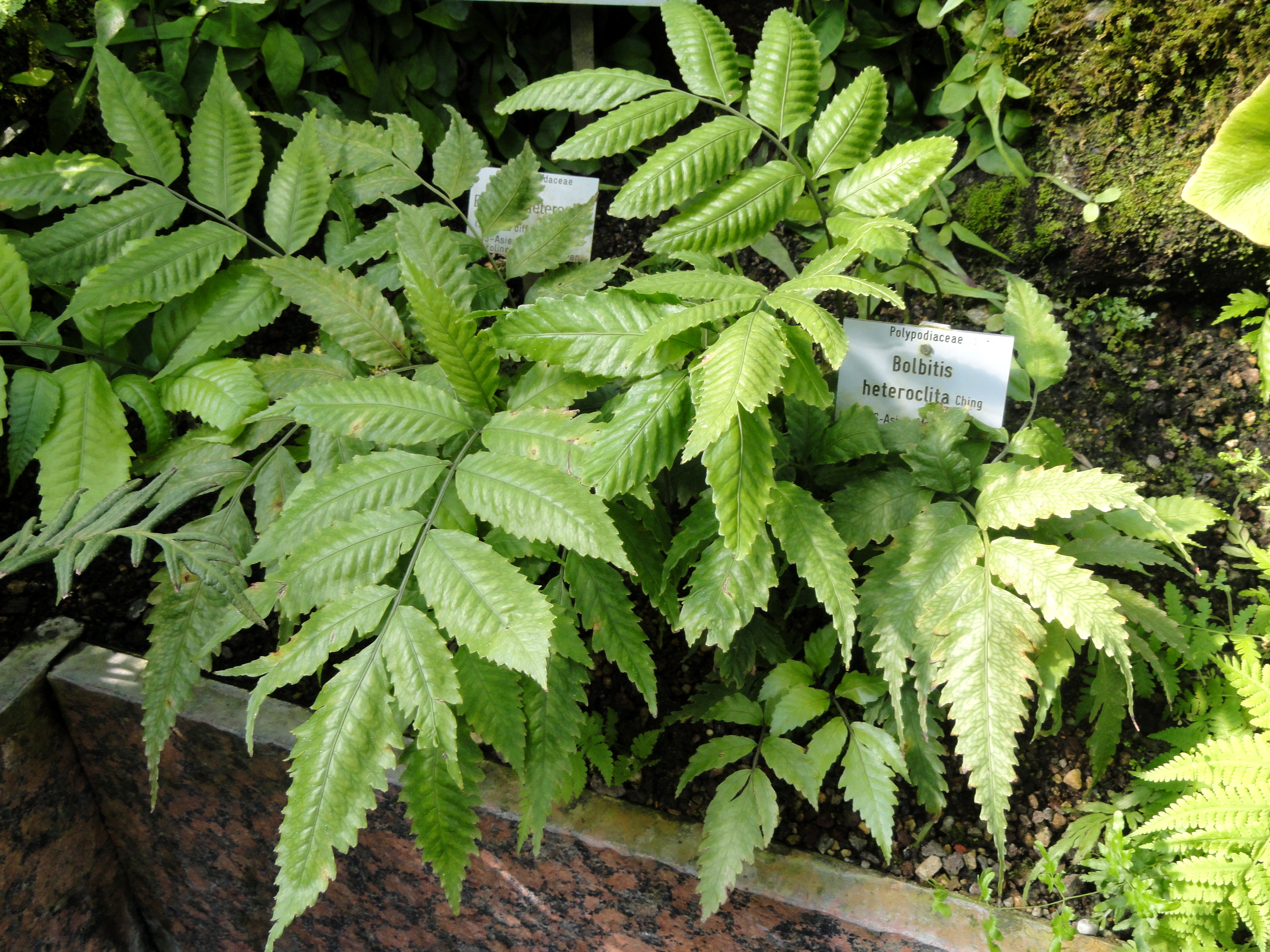 Bolbitis heteroclita specimen in the Botanischer Garten München-Nymphenburg, Munich, Germany.